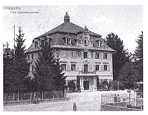 Landeshauptmann Adolf-Rhomberg-Haus, Marktstrasse 26 in Dornbirn (1900) Umbau, Fassade von Architekt Hanns Kornberger Postkarte um 1905